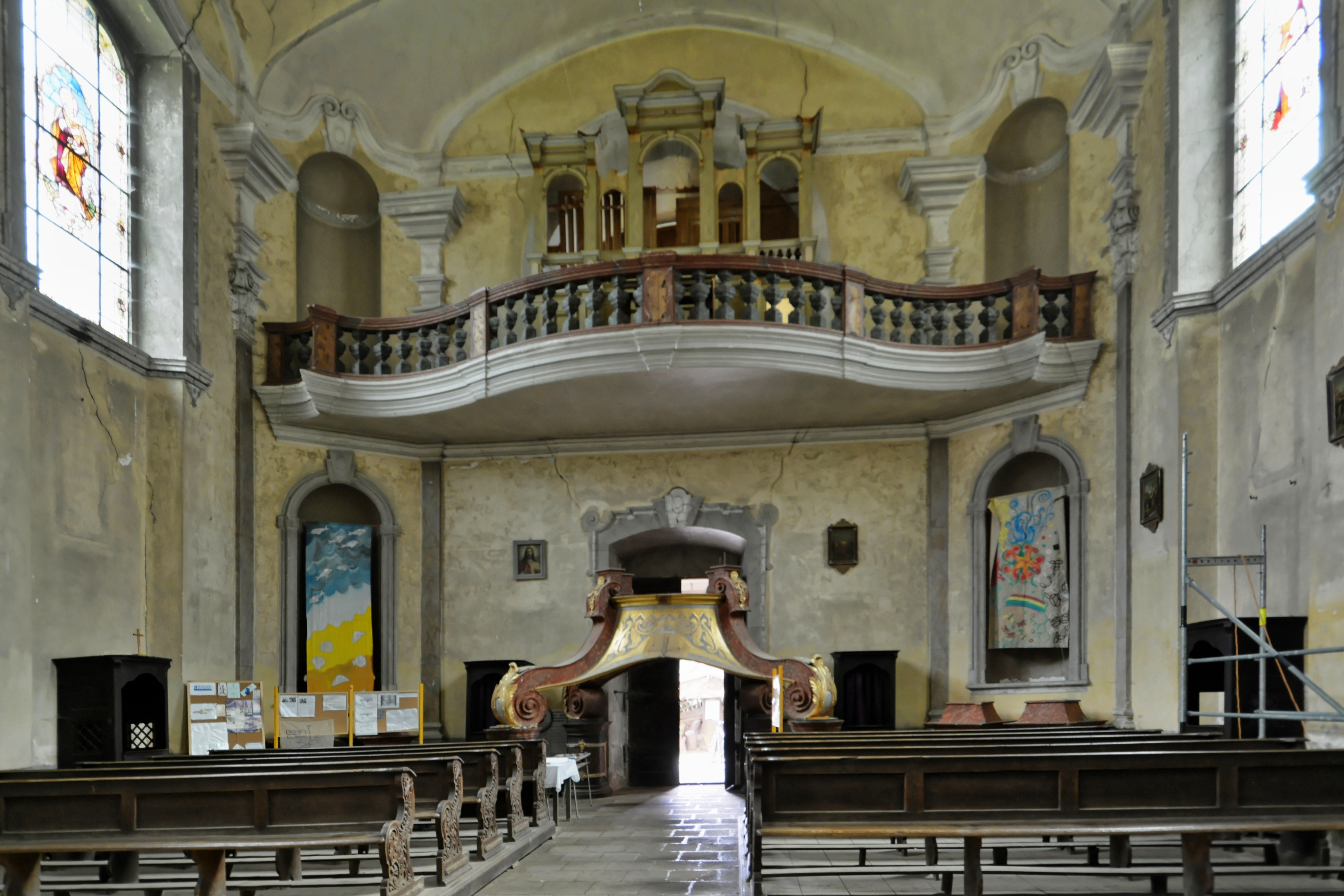 Kostel Navštívení Panny Marie ve Skocích u Žlutic, okr. Karlovy Vary. Interiér, pohled na udební kruchtu.